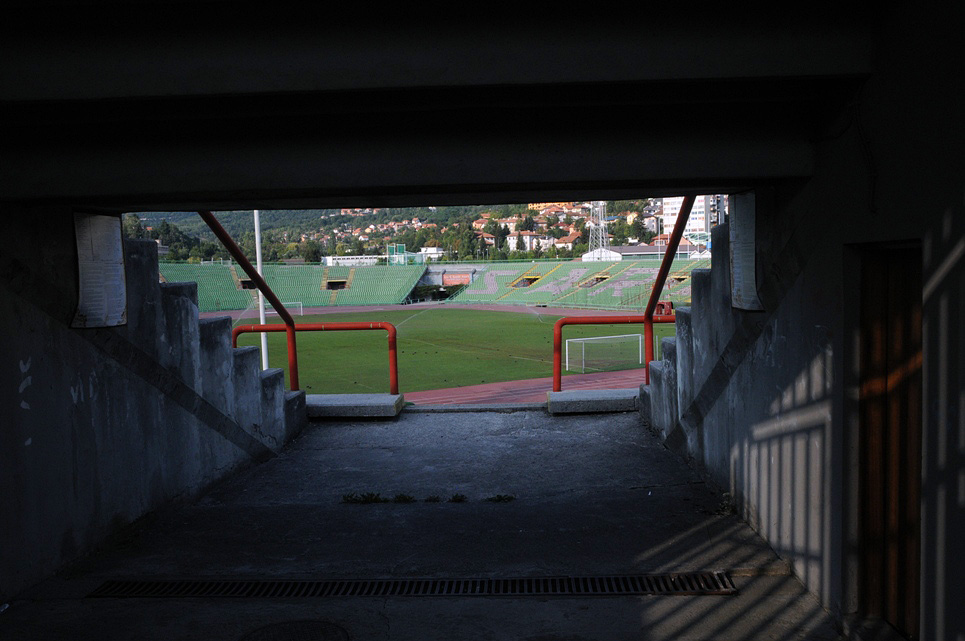 Koševo Stadium